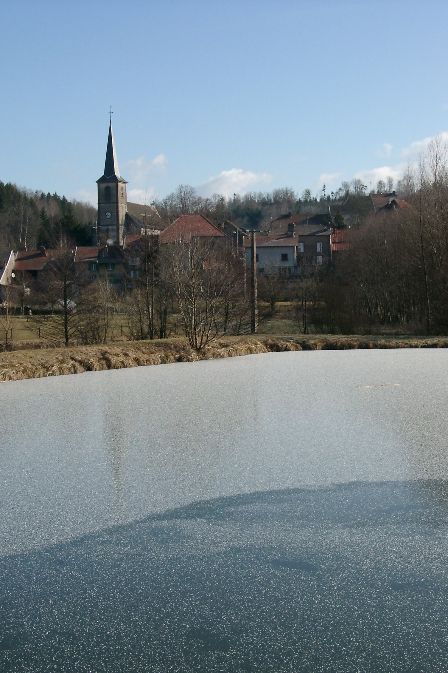 Val-et-Châtillon (Lorraine) vu depuis son étang